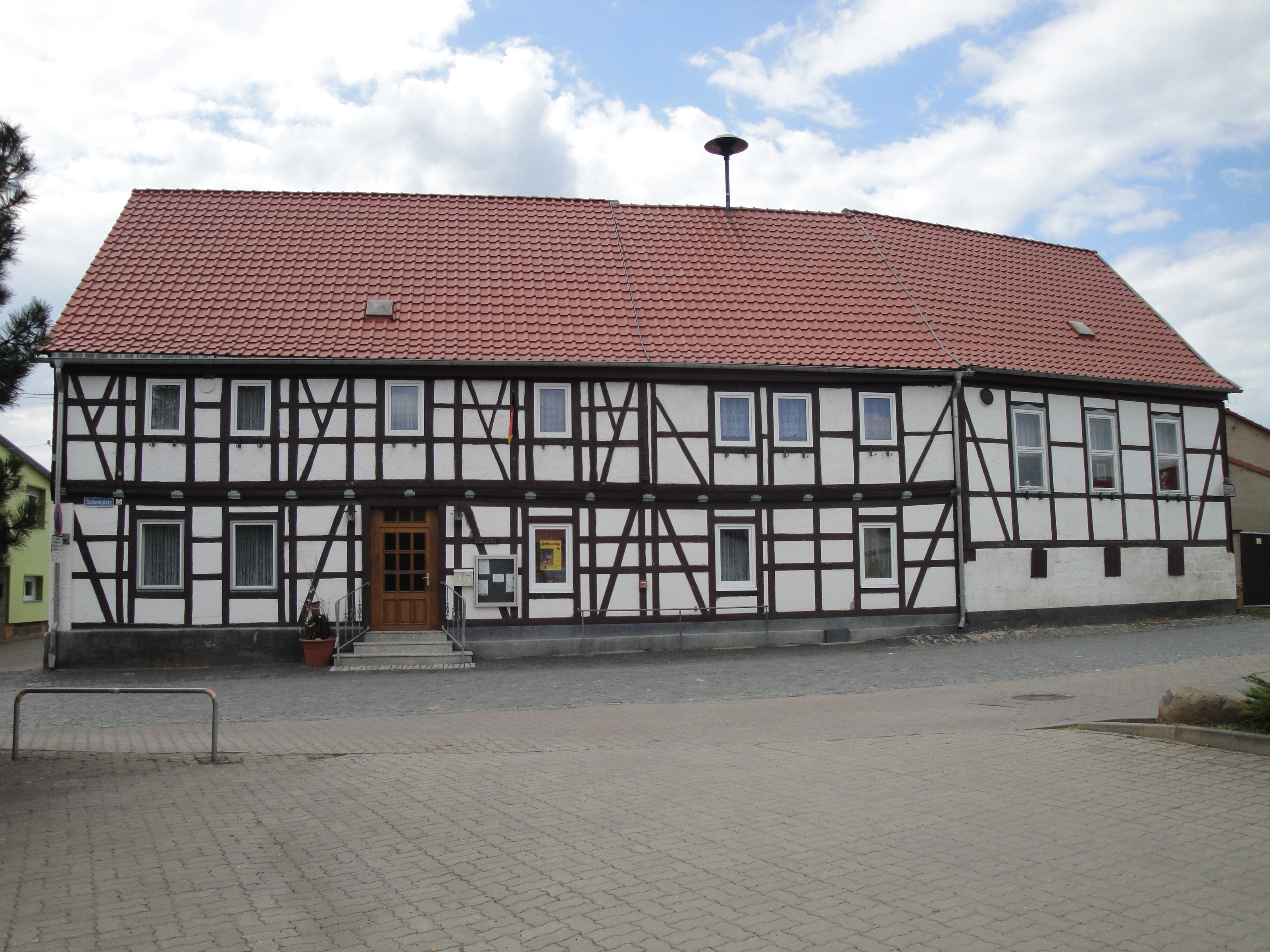 Gemeindeverwaltung Berga, Schenkplatz 5, 06536 Berga